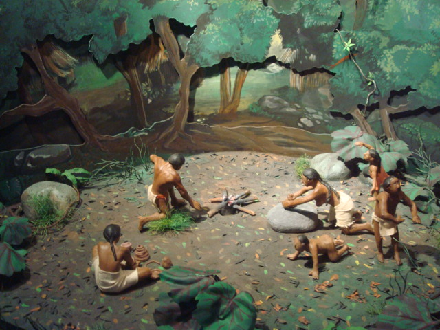 Maqueta representativa de la vida cotidiana del pueblo de los Botos, indígenas de Costa Rica que habitaron las llanuras de San Carlos y las cercanías de los volcanes Barva y Poás. Parque Nacional Volcán Poás.